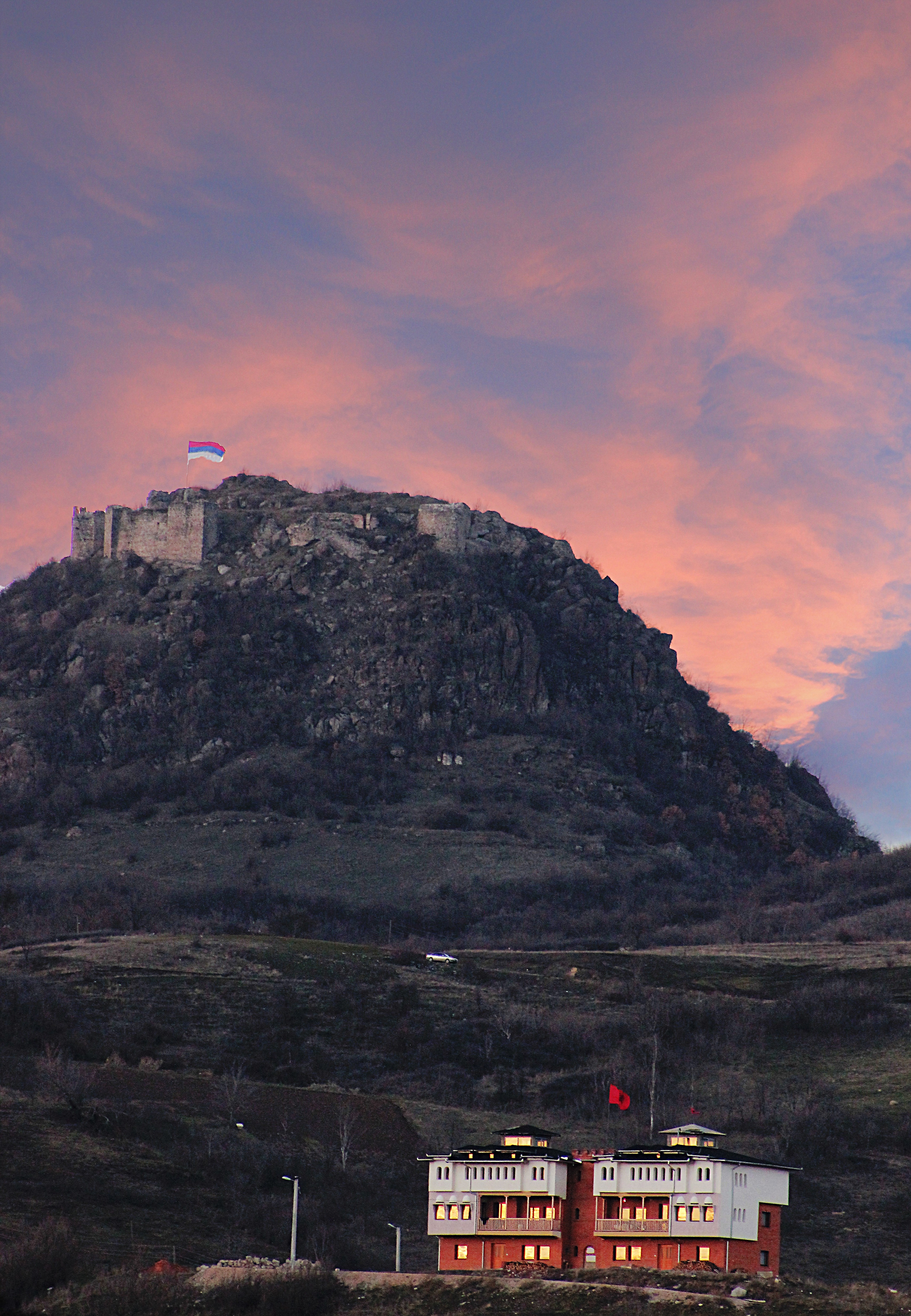 Pamje e shtëpisë së një banori shqiptar në veriun e Mitrovicës.